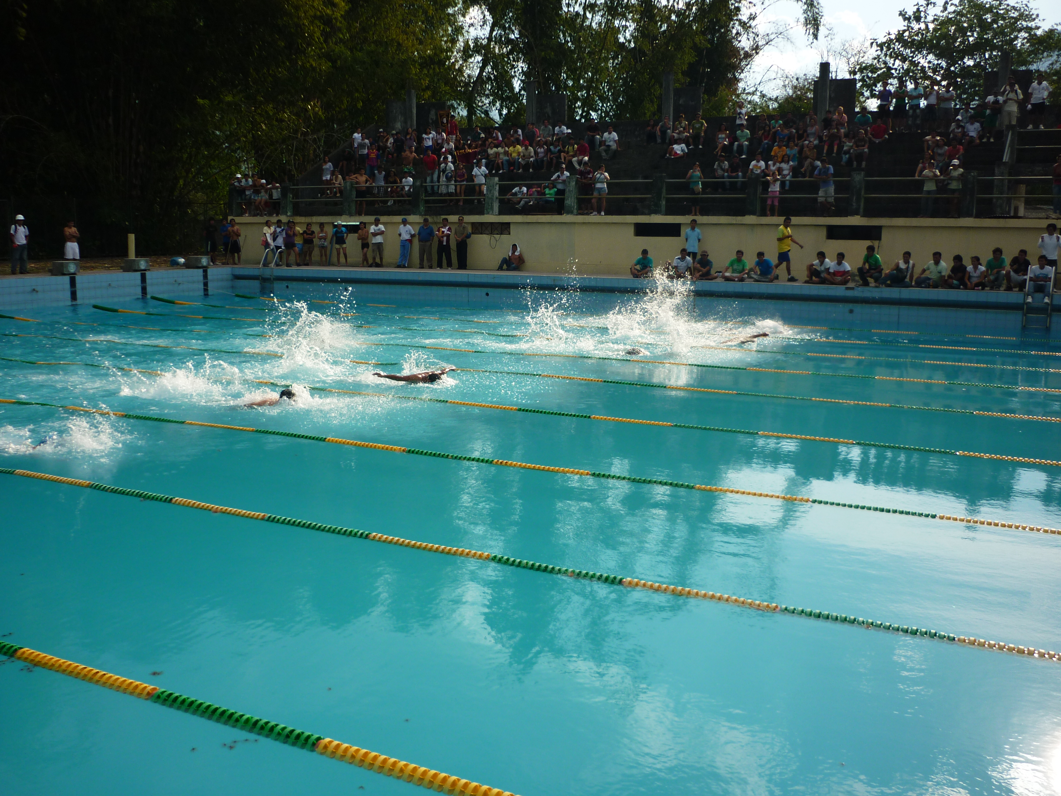 Alumnos practicando natación en la piscina de la UNAS